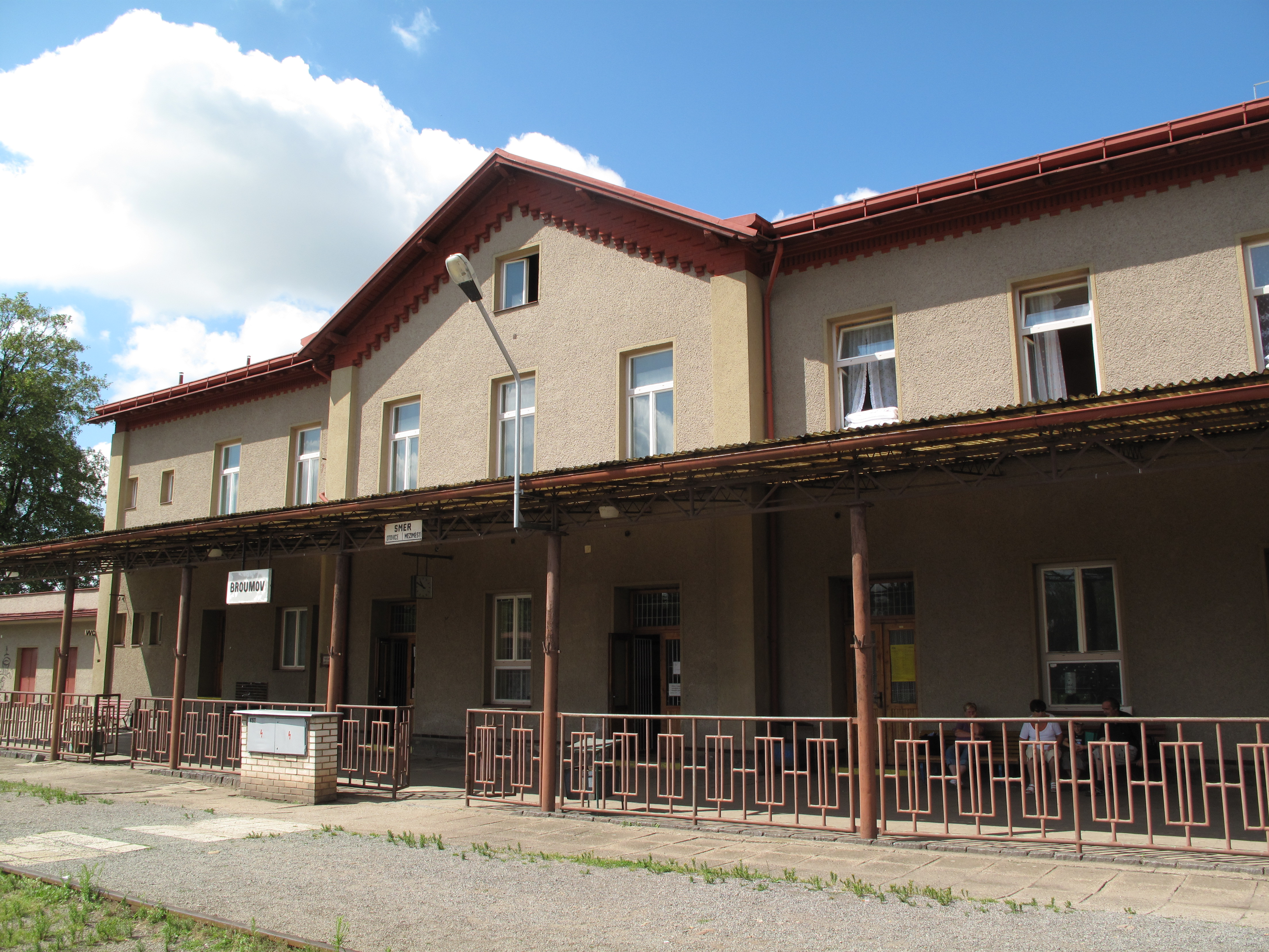 Česky: Broumov, vlakové nádraží